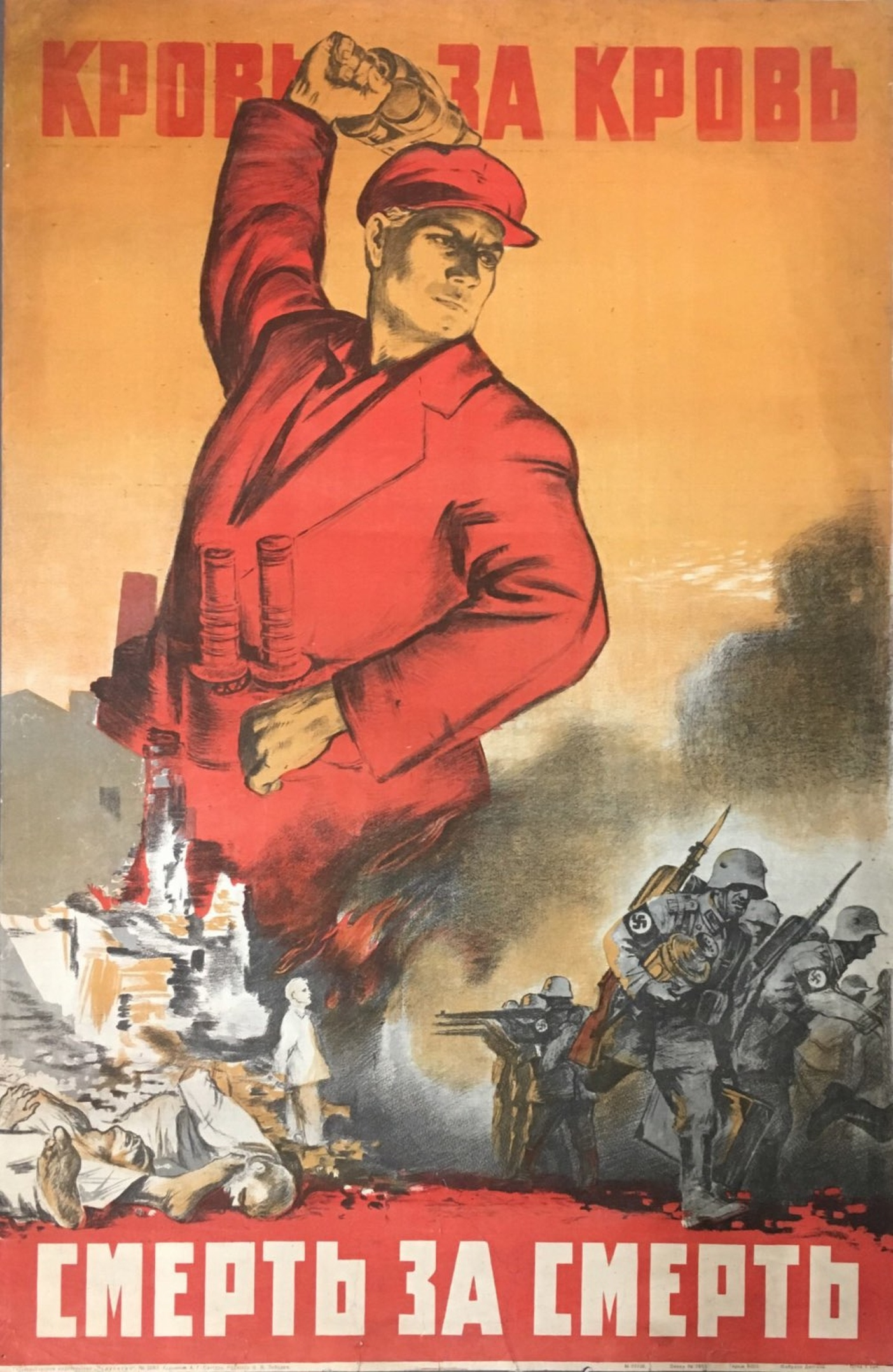 1942. Кровь за кровь! Смерть за смерть!.jpg